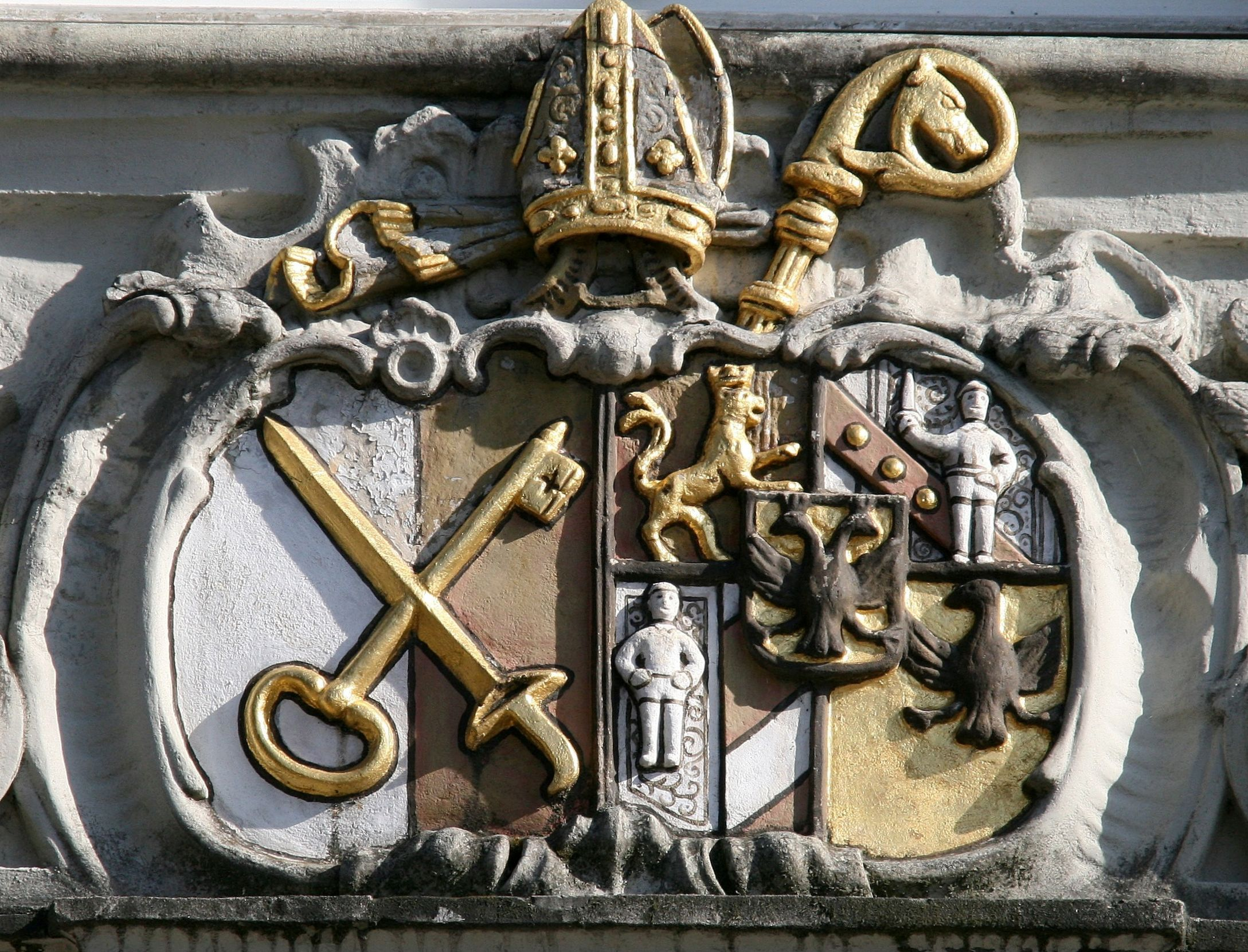 Abtswappen, Relief am Äußeren des Klosters Mehrerau, Bregenz, Vorarlberg.